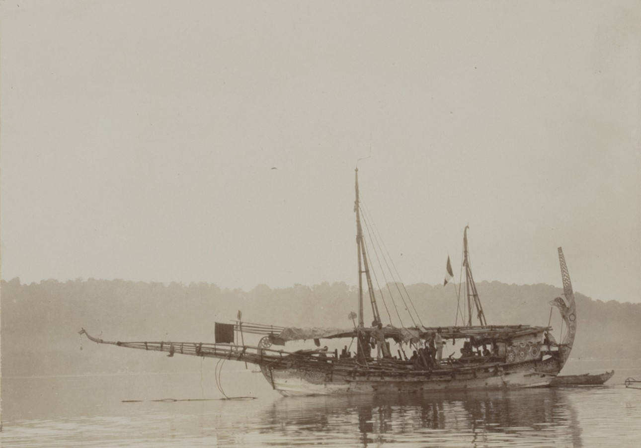 Academische Collecties: 1899-1900, Siboga-expeditie naar Nederlands Oost-Indië, onder leiding van Max Wilhelm Carl Weber